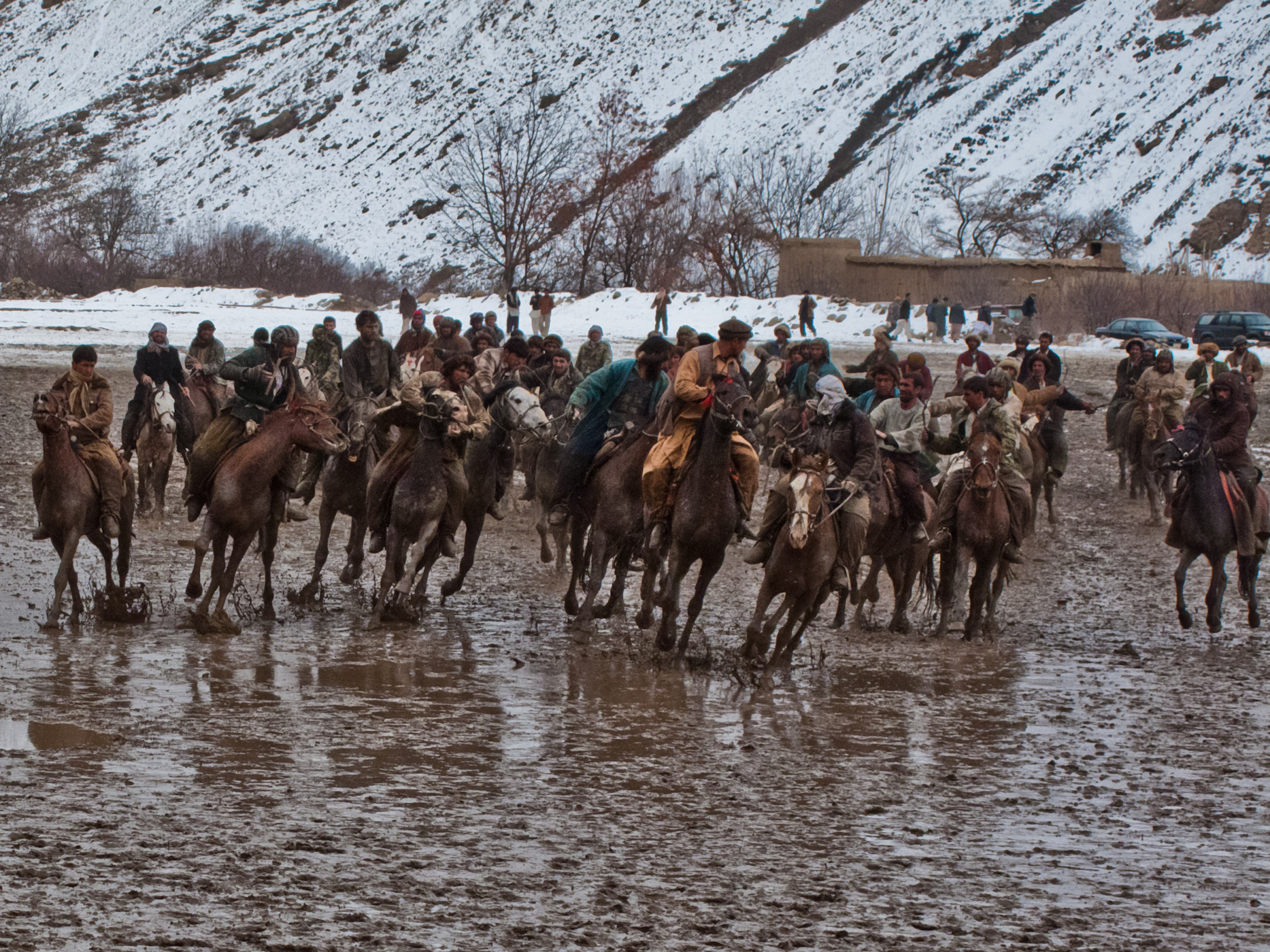 Buzkashi